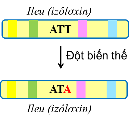 Đột biến thế có thể là đột biến trung tính, khi nó là đồng nghĩa.